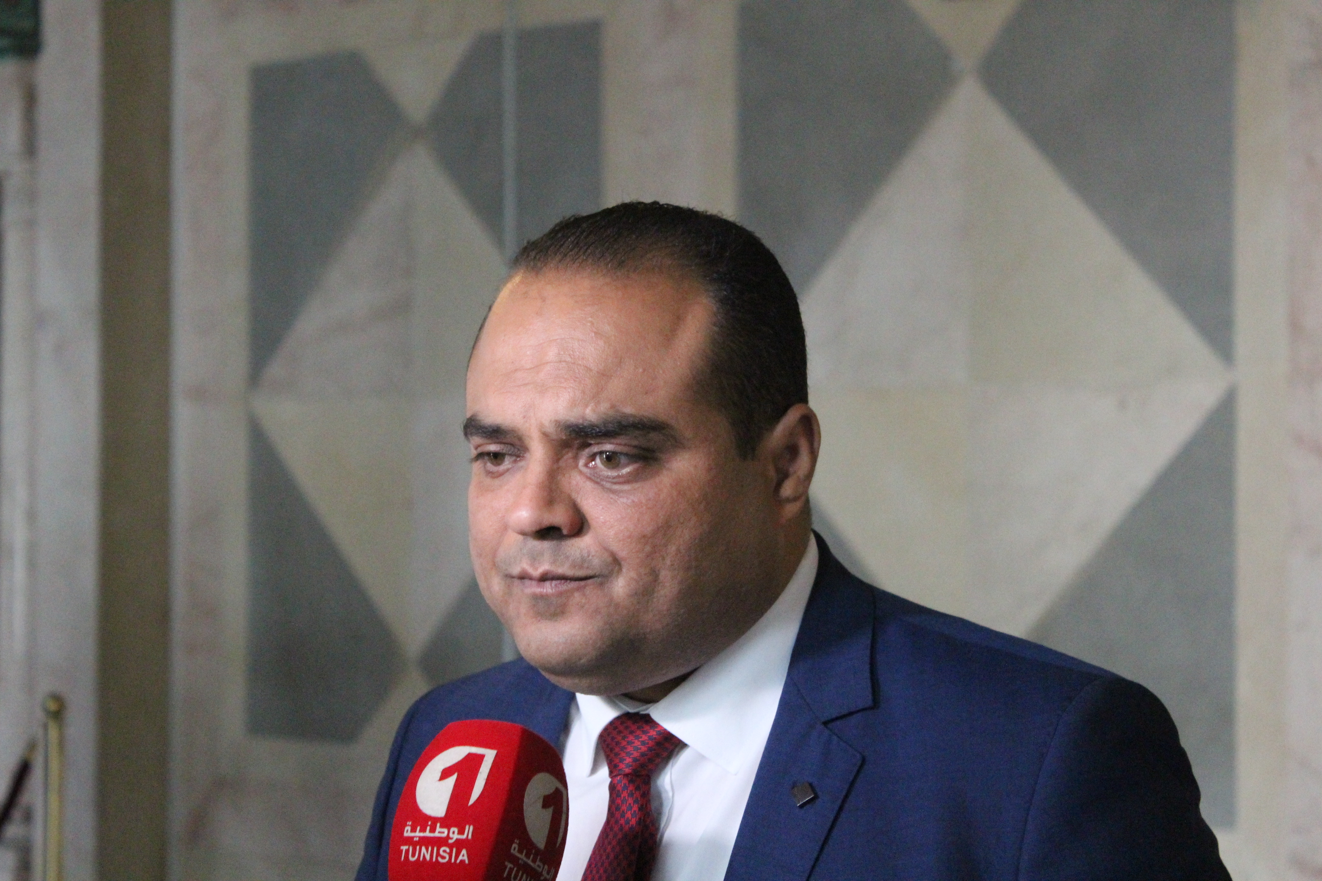 Bloc parlementaire: Mouvement Nidaa Tounes Député sur la région de Gafsa